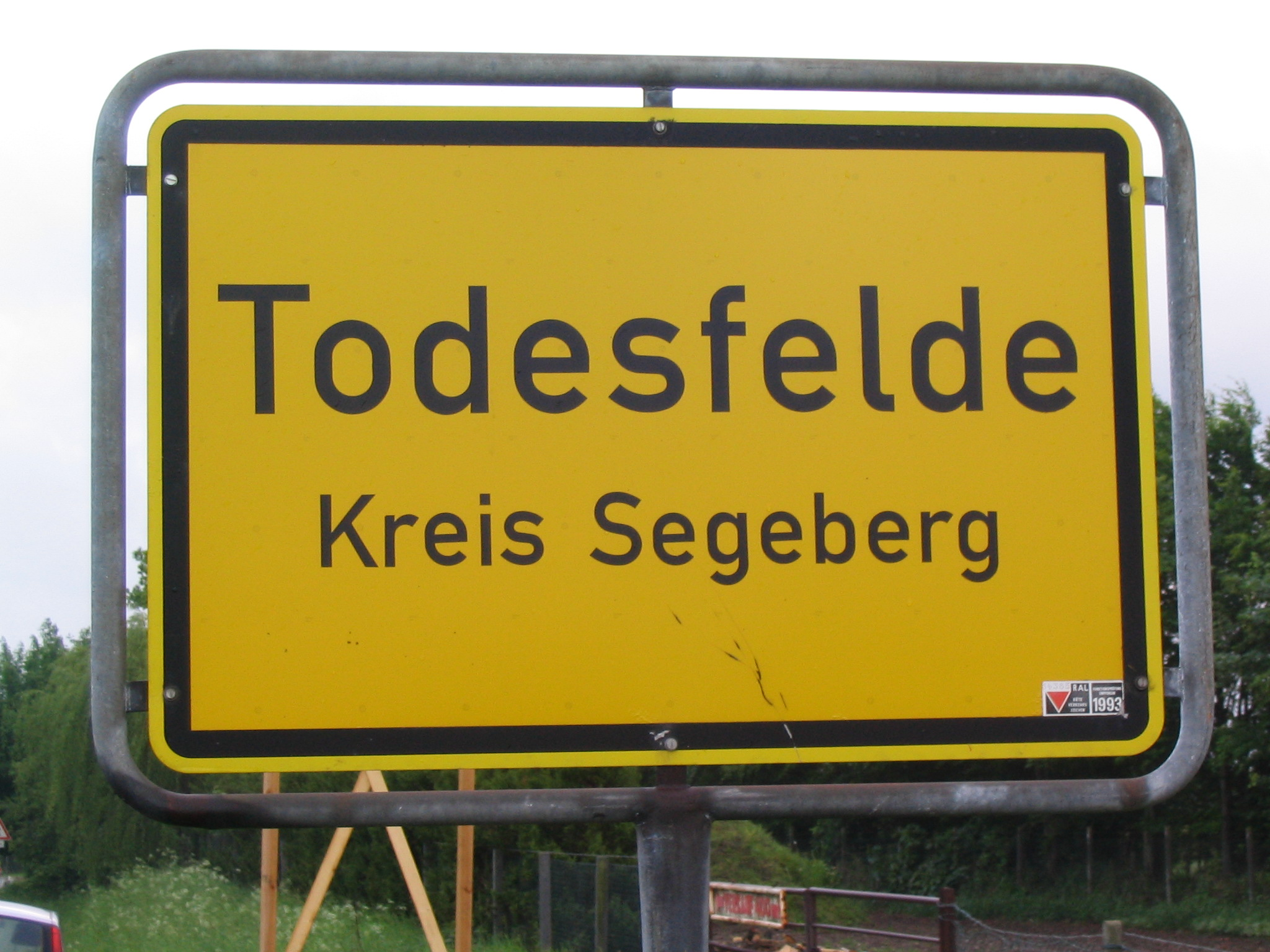 Road Sign Todesfelde in Germany